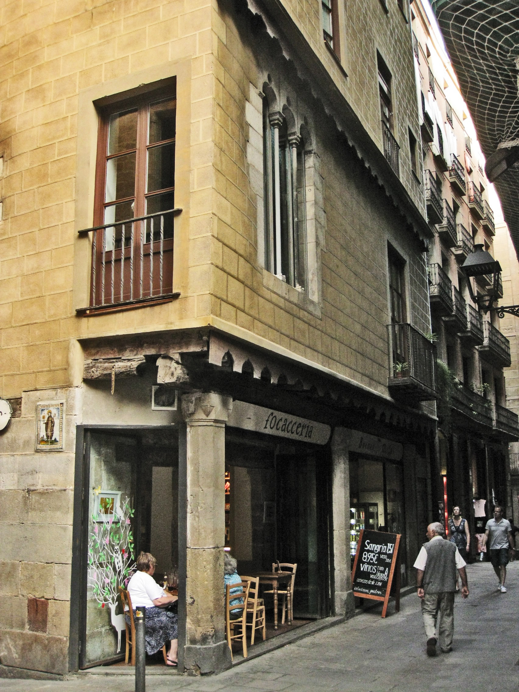 Edifici del carrer de la Freneria núm. 14, a la cantonada amb la Baixada de Santa Clara, al barri Gòtic de Barcelona. Originària del segle XV, fou reformada al segle XVIII.